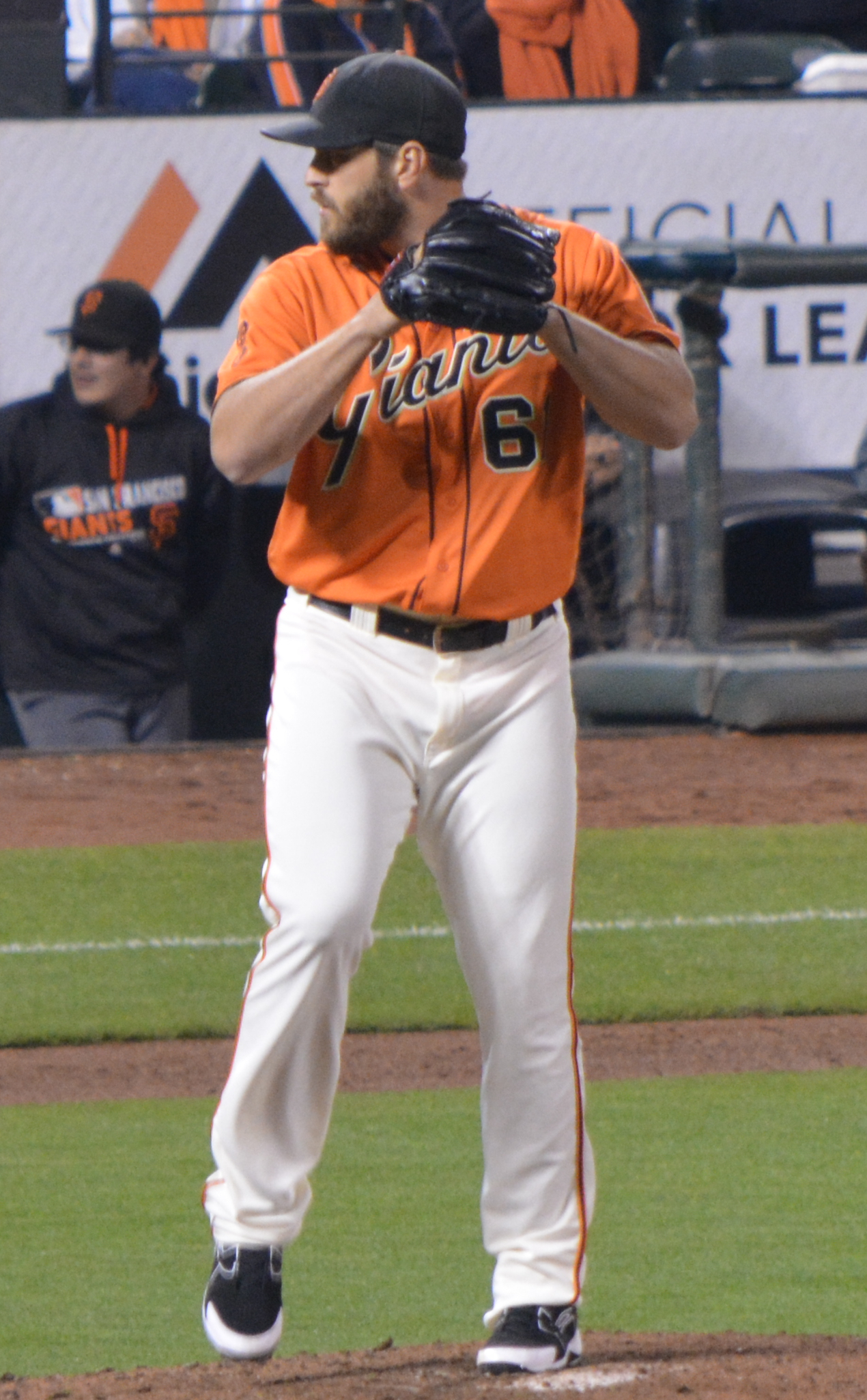 Josh Osich